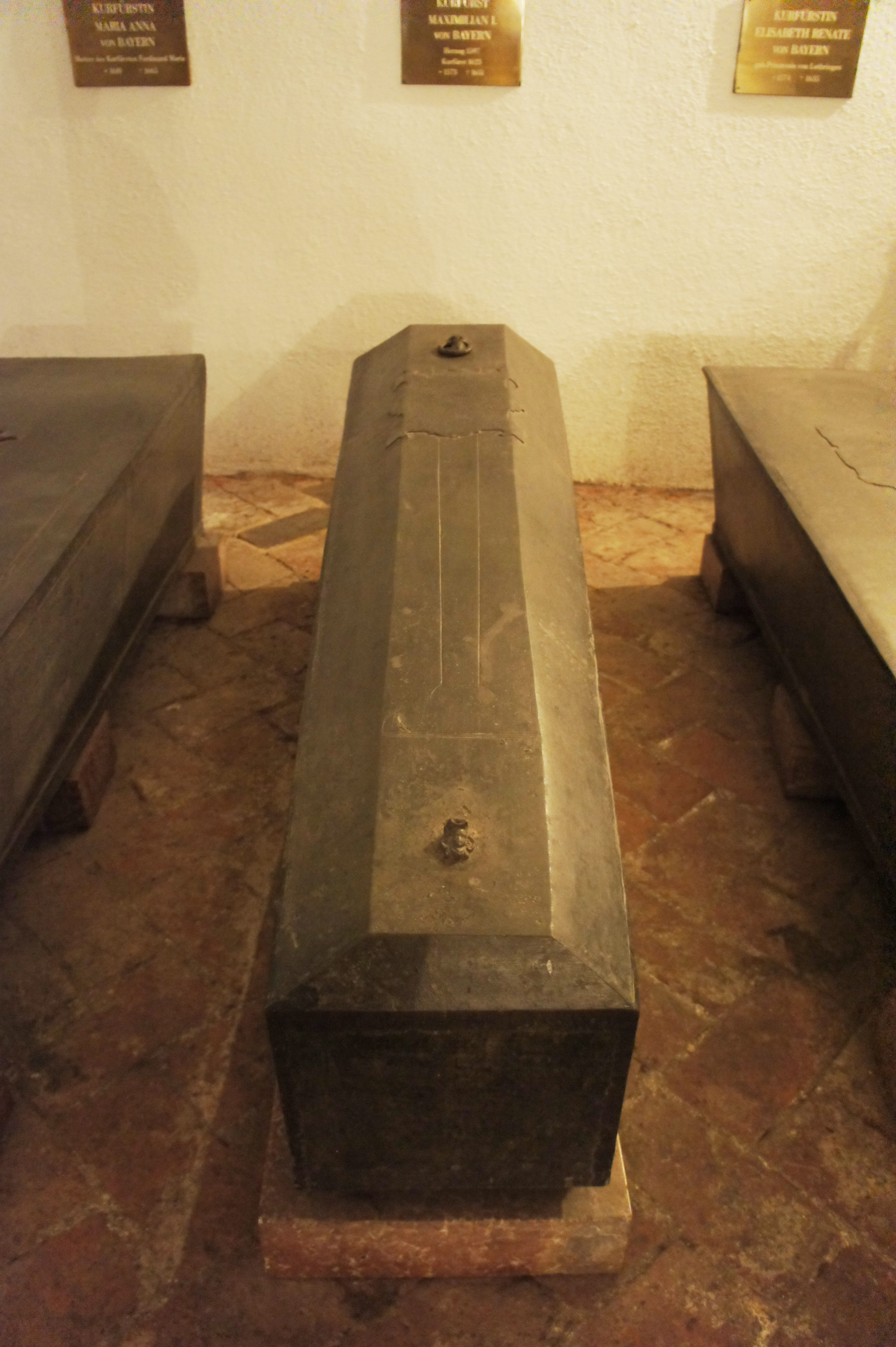 Maximilian I., Kurfürst von Bayern (17. April 1573 – 27. September 1651). Sarkophag in der Grablege der Wittelsbacher in der St. Michael Kirche in München.